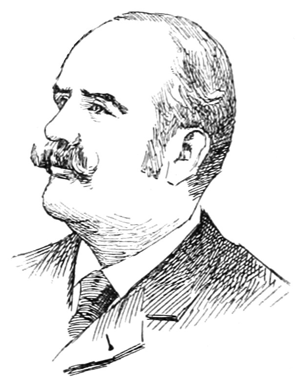 "La Nouvelle Chambre" : "Cochin".